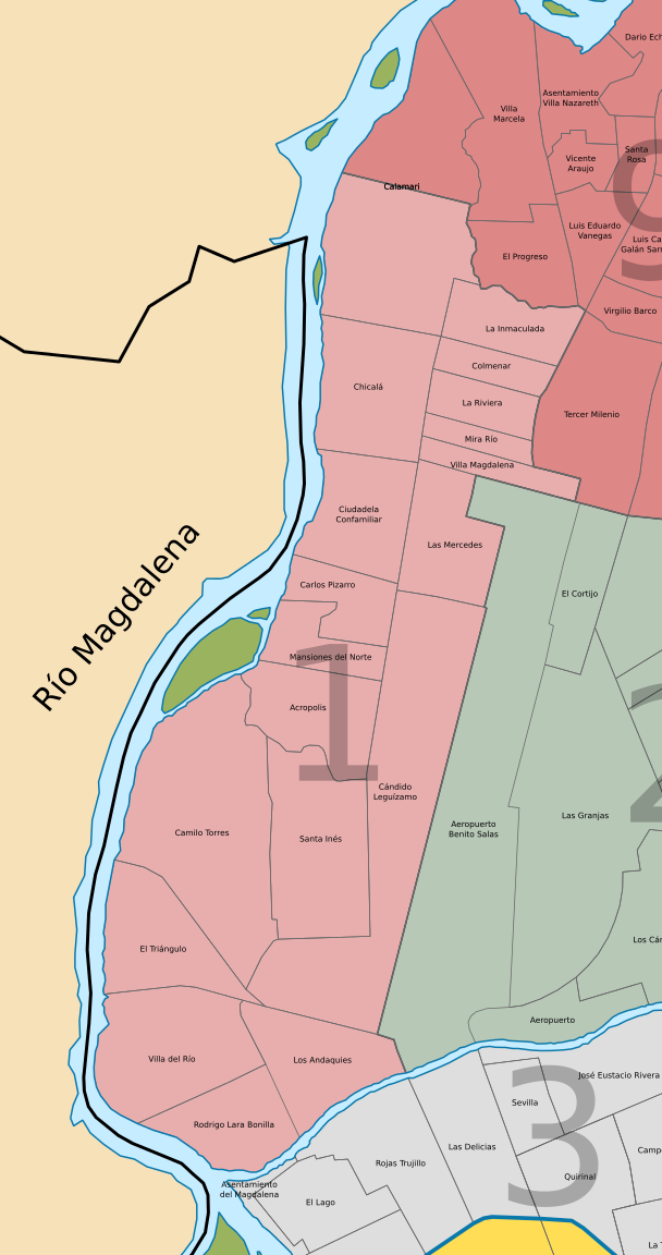 División barrial comuna 1, Neiva, departamento de Huila